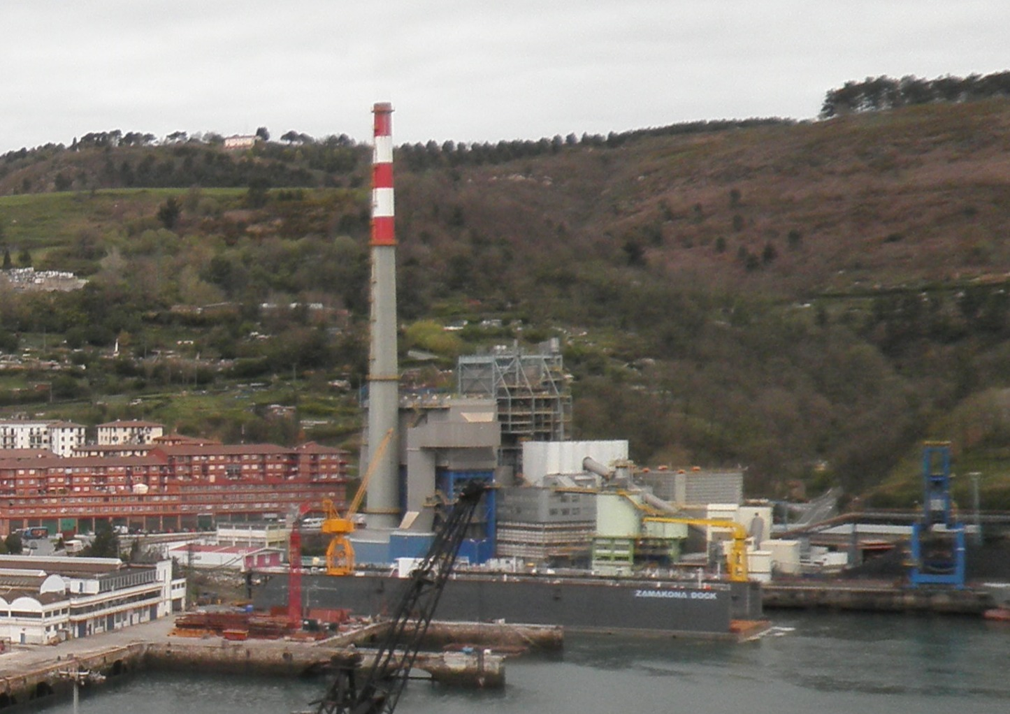 Central térmica de Pasajes en Guipúzcoa (España)